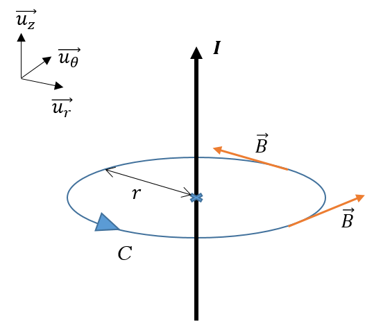 Contour d'Ampère pour le calcul du champ magnétique sur un fil infini